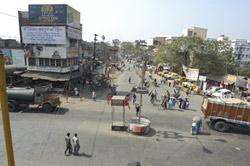 Madhyamgram Chowmatha